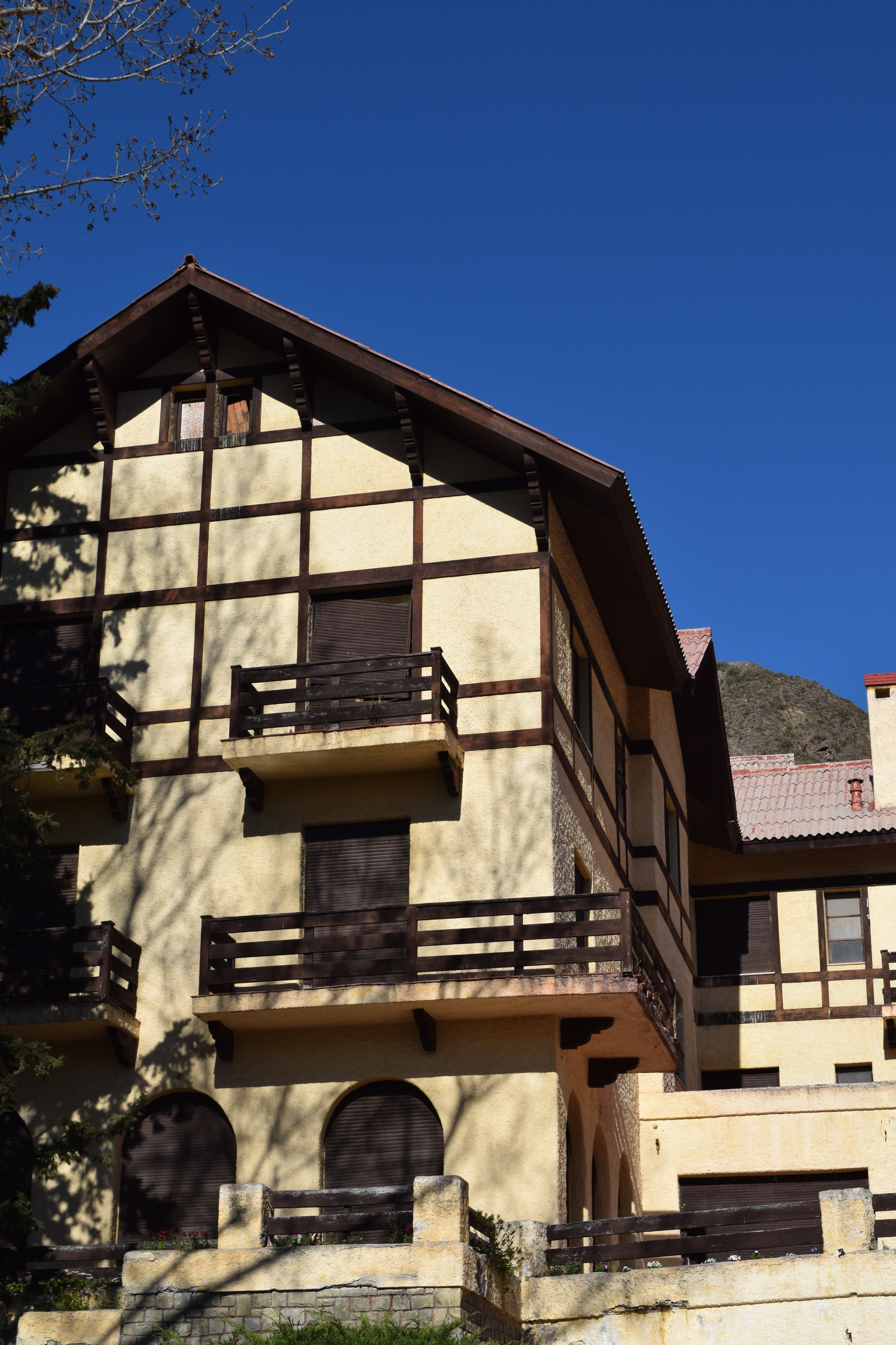 El edificio del Gran Hotel Villavicencio ubicado dentro de la Reserva Natural Villavicencio, en Mendoza, Argentina.